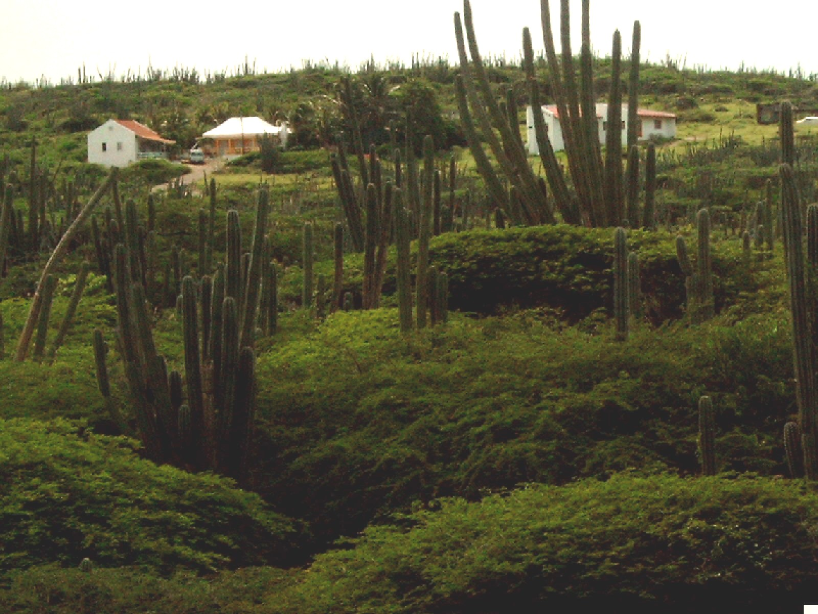 De kunuku op Aruba. Eigen opname.